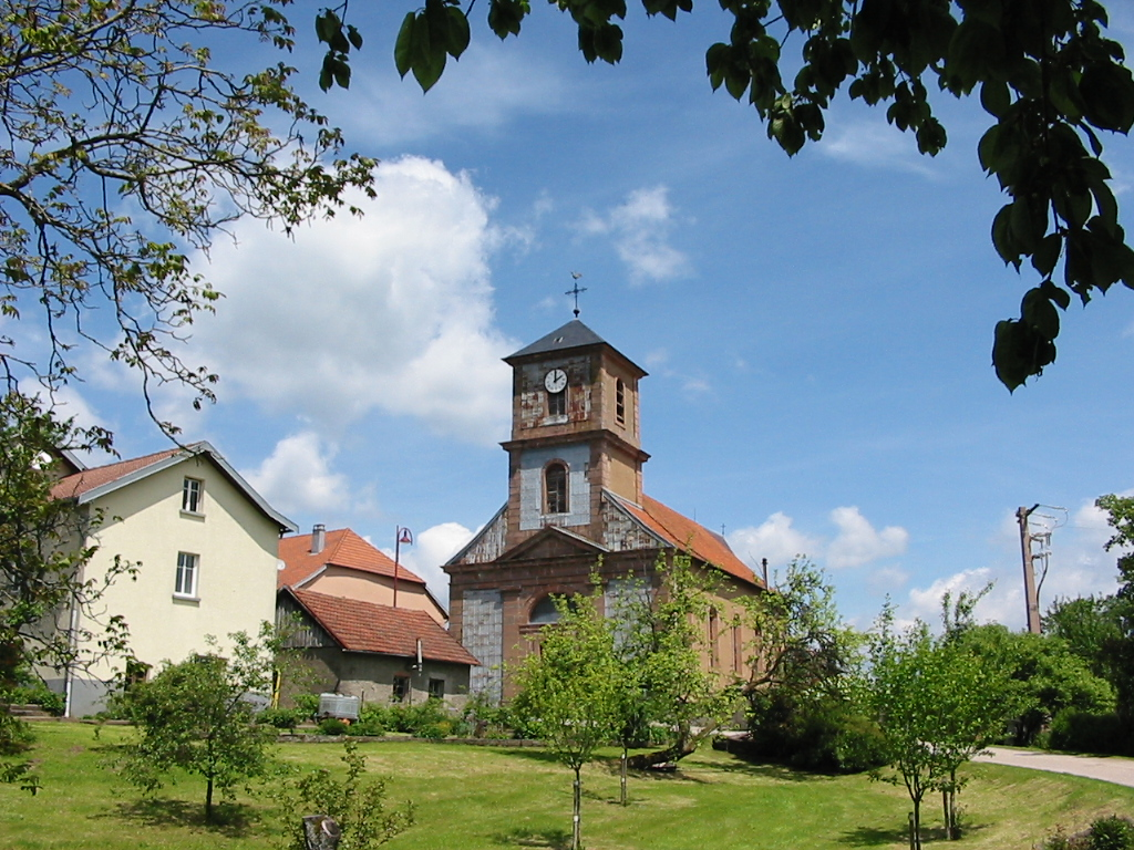 La Grande-Fosse, Église Saint-Gondelbert Commune du canton de Provenchères-sur-Fave (Vosges) Photo personnelle du 4 juin 2006. Copyright © Christian Amet